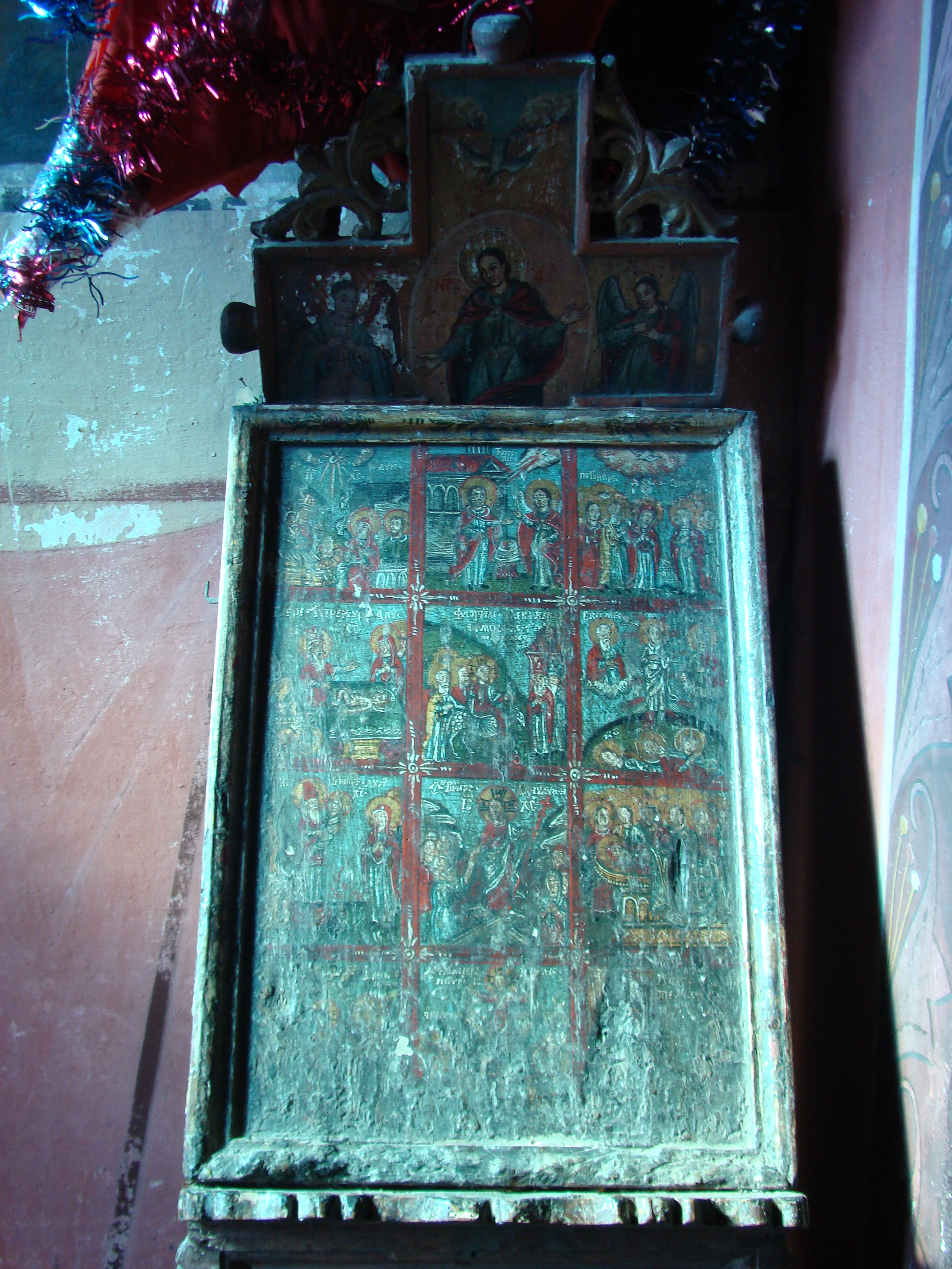 Biserica „Sf. Nicolae", sat DOBROŢ; comuna TOMEŞTI